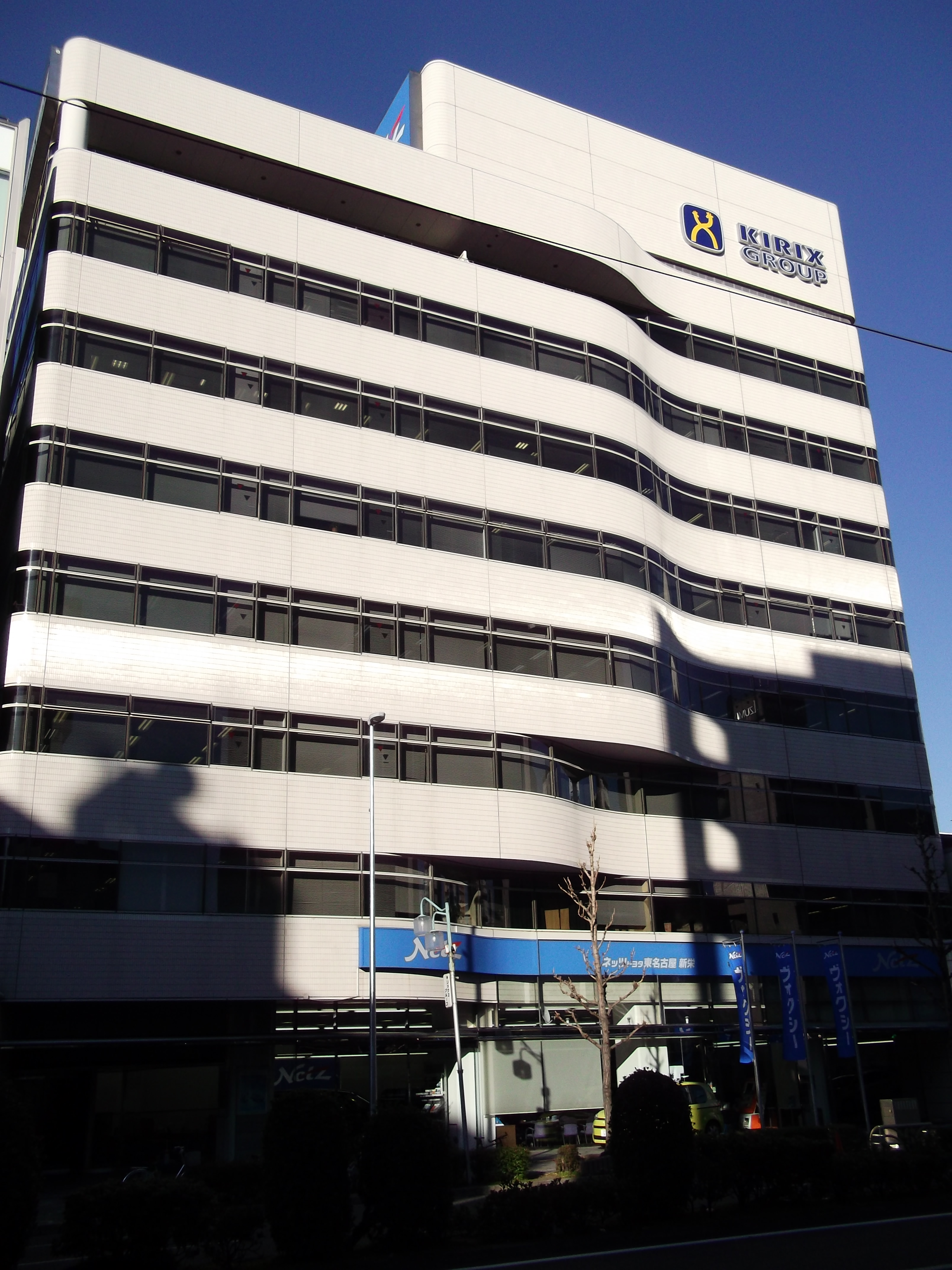 名古屋市中区葵に位置するキリックスビルを南側から写す